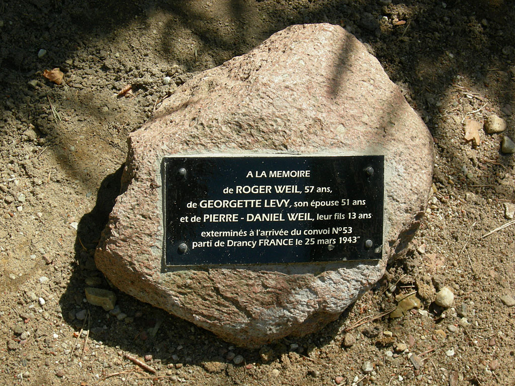 Pierre commémorative sur Himmelstrasse.